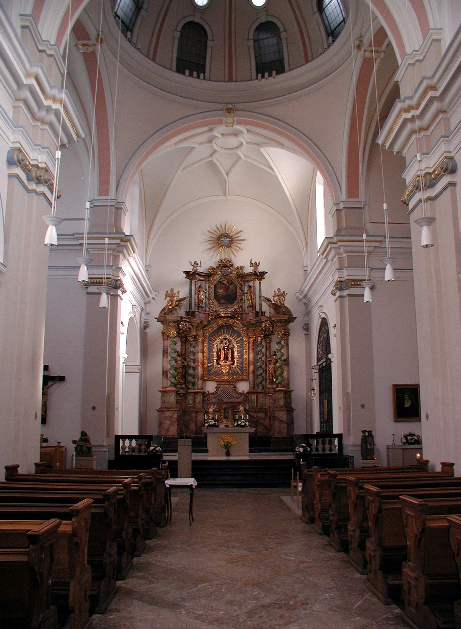 St. Maria vom Frieden, Köln